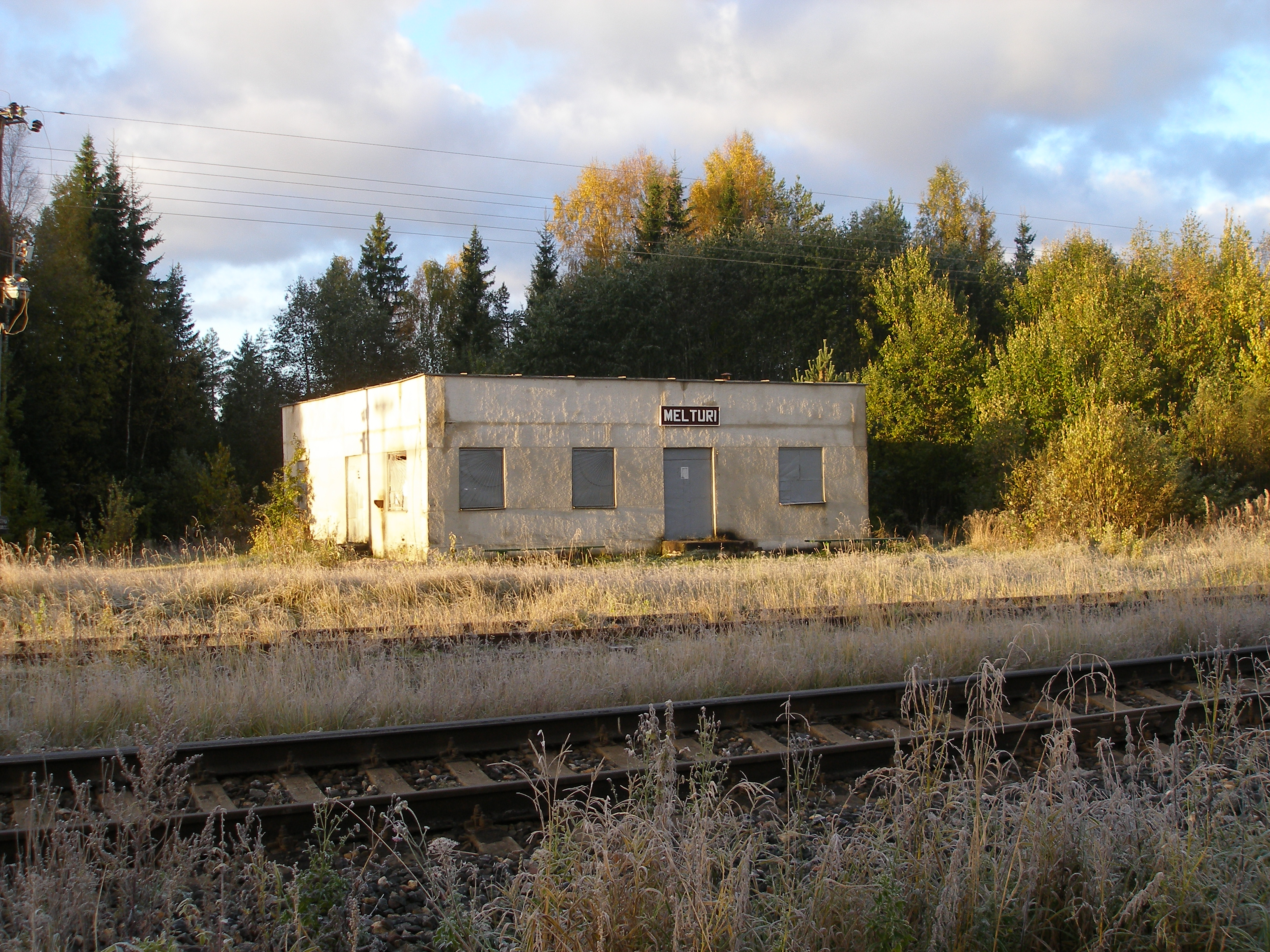 Pieturas punkts Melturi. Priekšplānā līnija Rīga - Valka, aizmugurē - slēgtā līnija Ieriķi - Abrene.